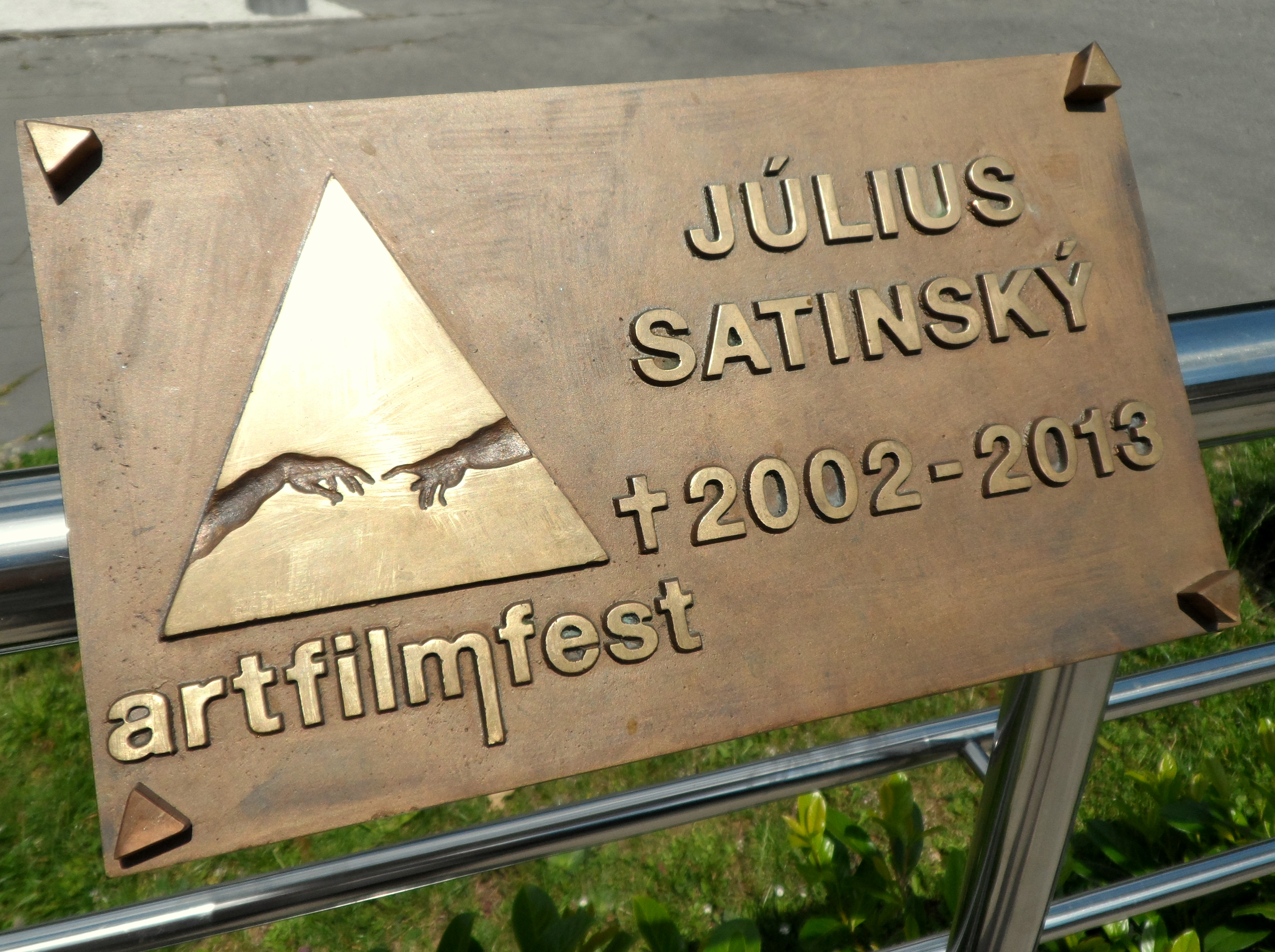 Mosadzná plaketa: „HERCOVA MISIA“ (Actor‘s Mission Award). Medzinárodný filmový festival Art Film Fest, Trenčianske Teplice